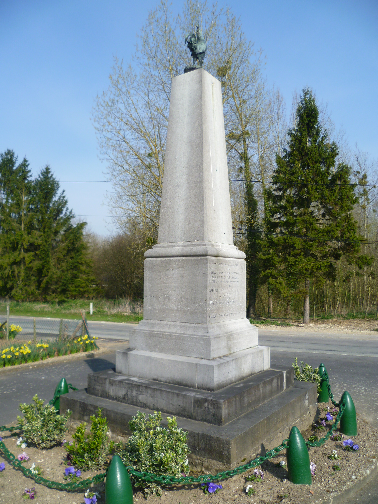 Inauguration le 17/0/1921